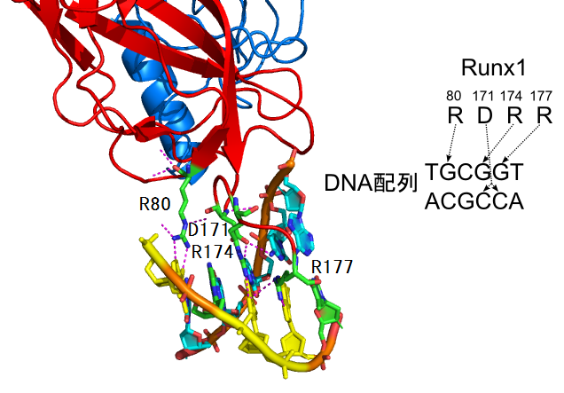 Runx1-CBFβ-DNA複合体の拡大図。赤色で示した分子がRunx1で、青色で示した分子がCBFβ。DNAのうち黄色で結合に関わるグアノシン（G）を示す。PDBid=1H9Dより作成。